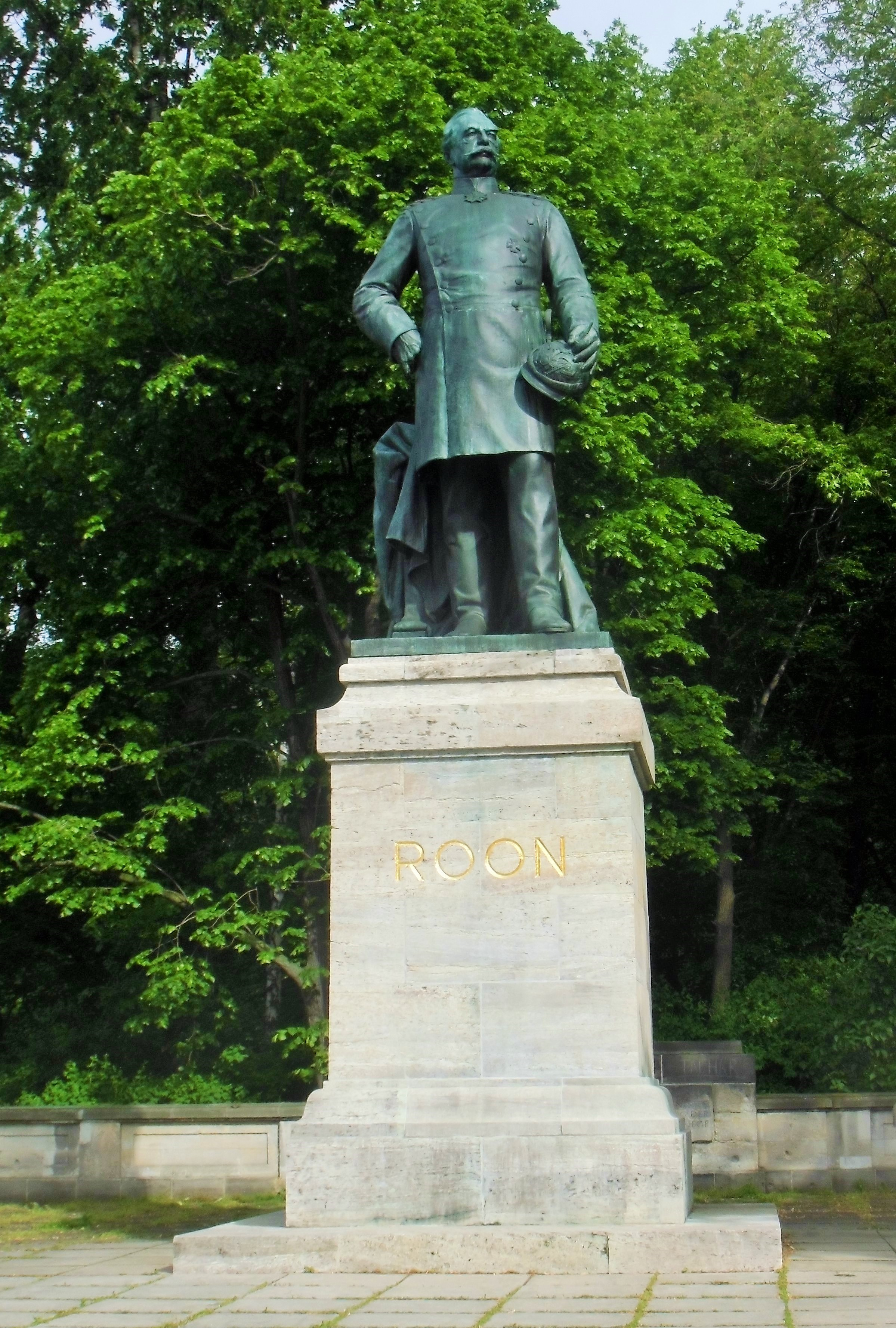 Bronzedenkmal von Albrecht Graf von Roon am Großen Stern im Tiergarten von Harro Magnusson 1904